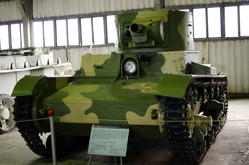 Огнеметный танк ОТ-130 в Музее бронетехники в Кубинке.